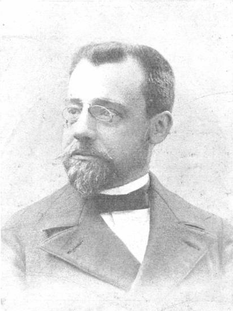 Antoni Elías de Molins.